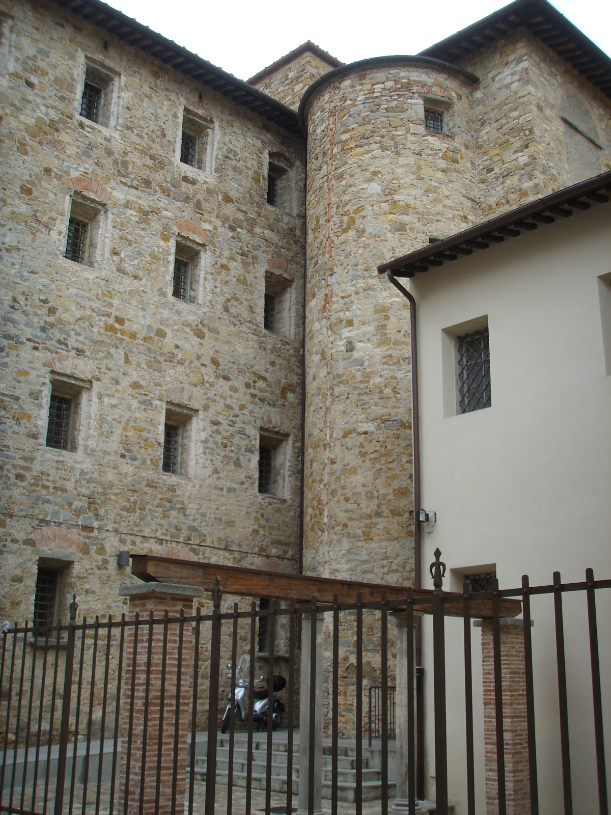 Complesso delle murate